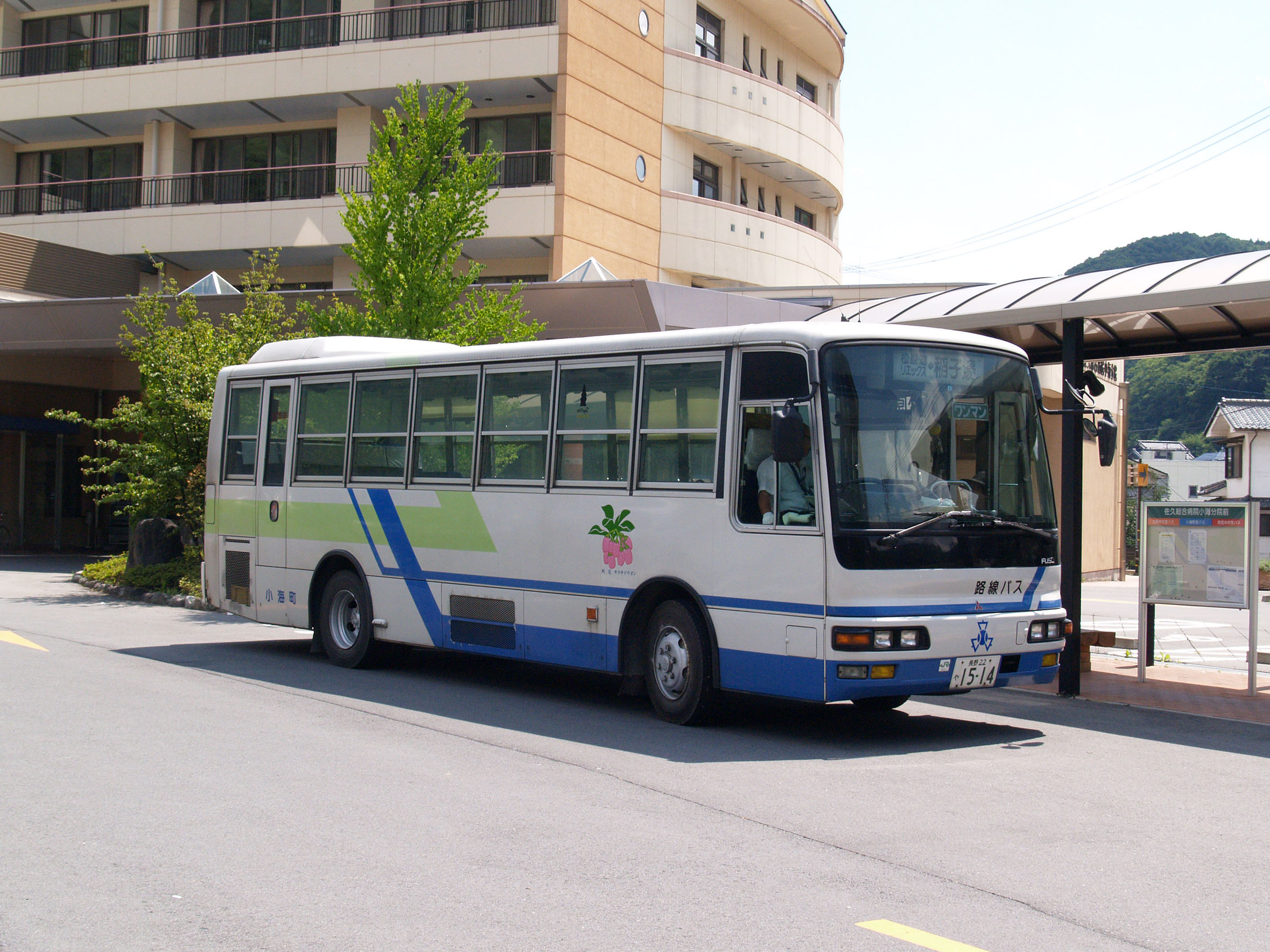 小海町営バス（佐久総合病院小海分院前にて）